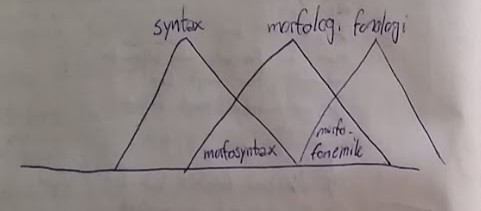 overlappende videnskaber og delmængder af vidensfelter